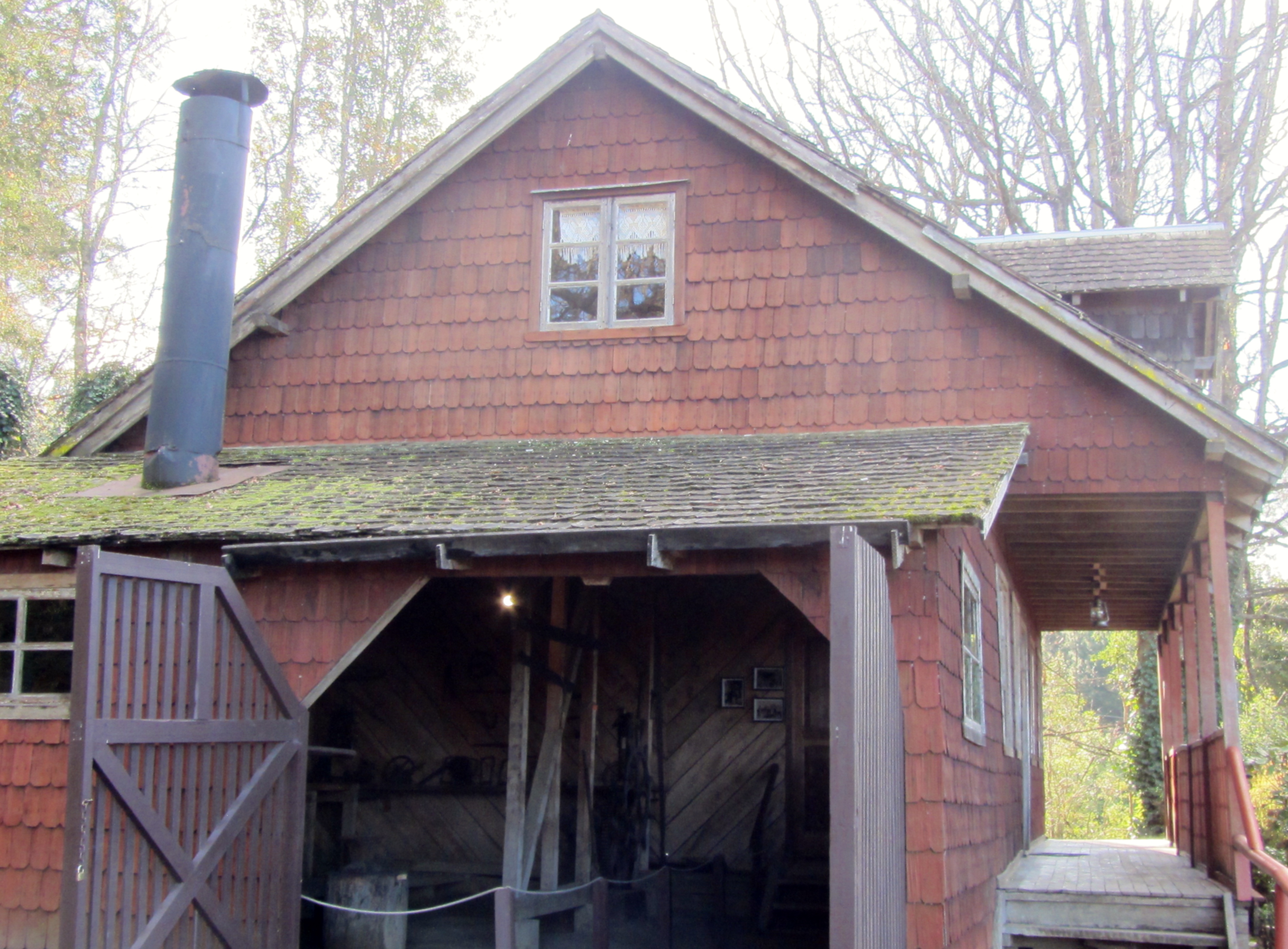 Casa del herrero, Museo Colonial Alemán de Frutillar, Chile.